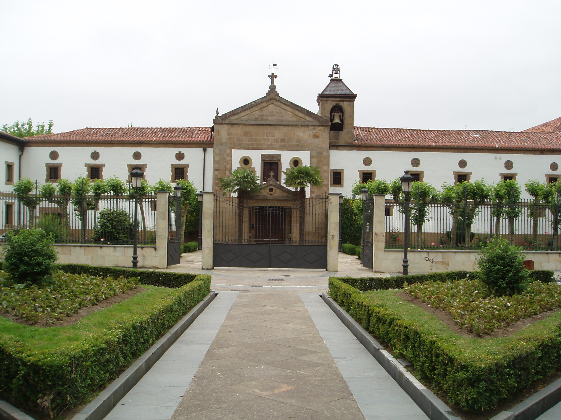 Vista frontal del convento de las Brígidas de Lasarte-Oria. Foto tomada desde las escaleras situadas justo enfrente.